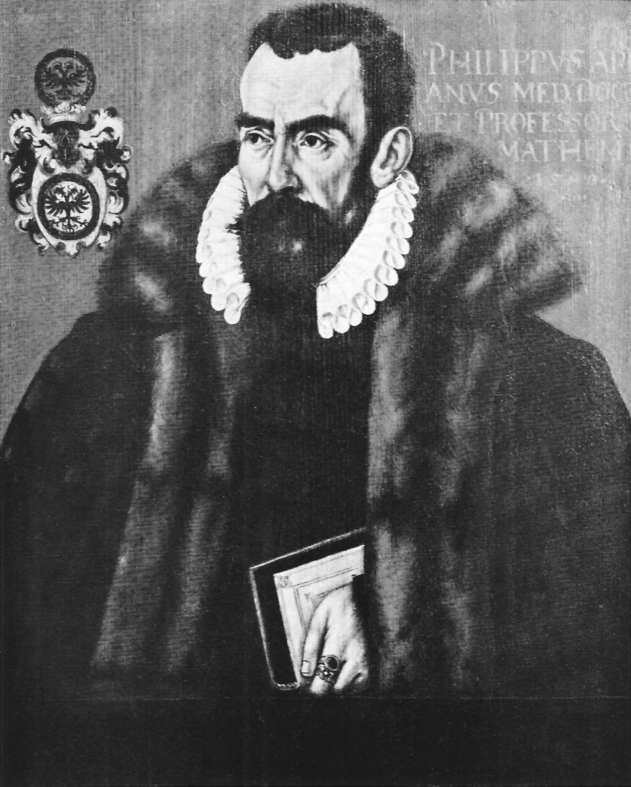 Prof. Philipp Apian (Öl auf Holz, Tübinger Professorengalerie)